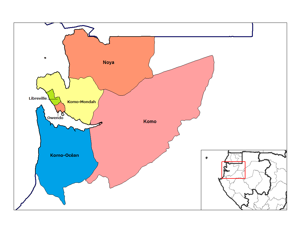 エスチュエール州（Estuaire）の県（Departement）の地図。ガボン2013年国勢調査の資料に基づく：[1]